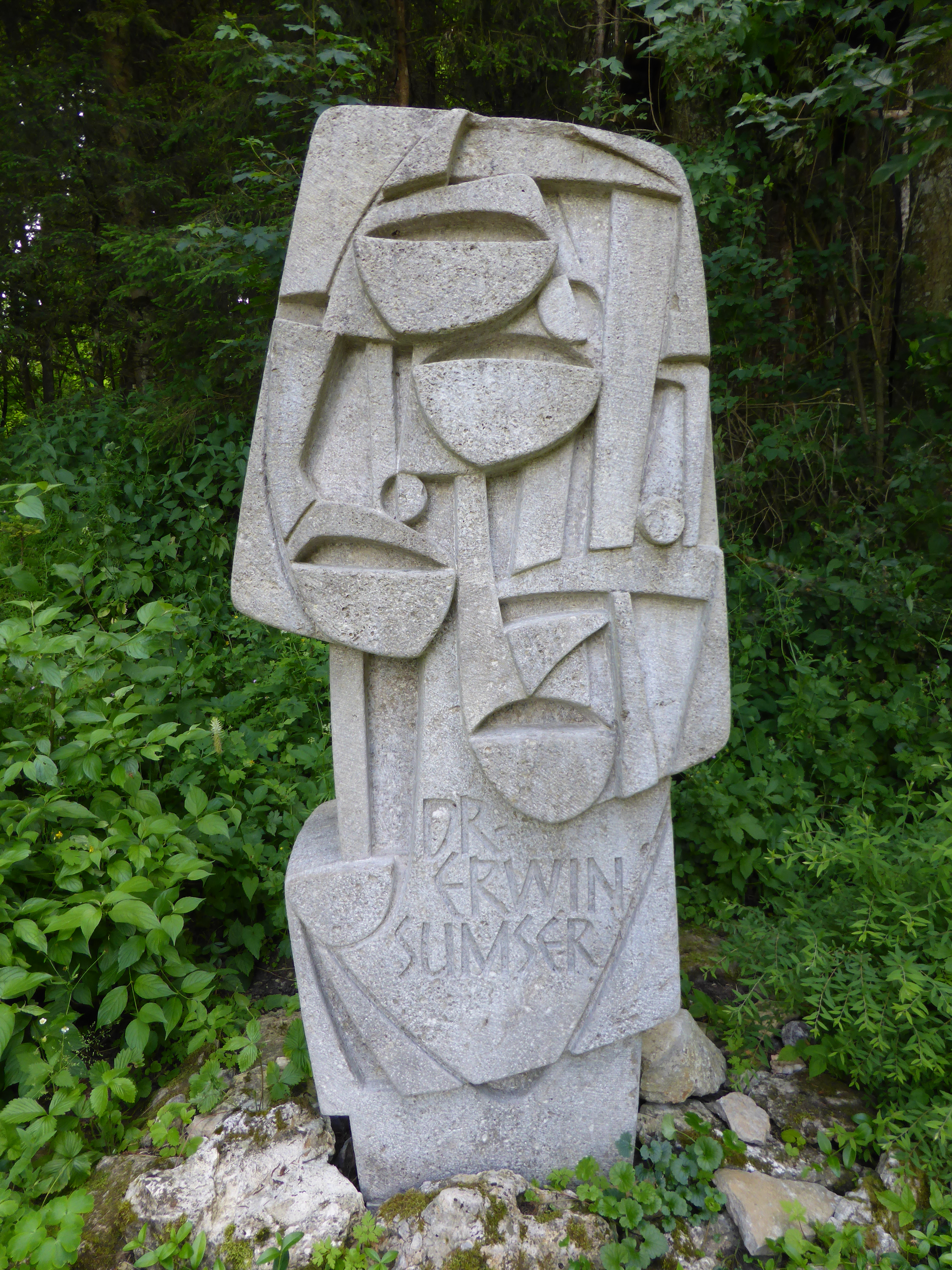 Gedenkstein für Dr. Erwin Sumser, zwischen Hüfingen und Bräunlingen gelegen; Motiv: stilisierte Frauenschuh-Blüten